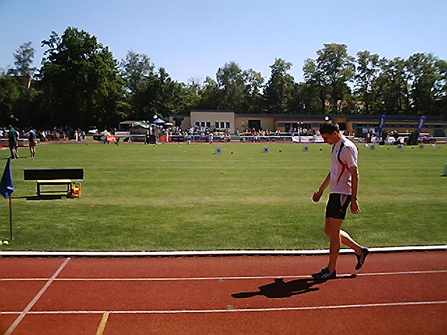 René Herms vor seinem Start über 400 Meter bei den Sächsischen Landesmeisterschaften 2006 in Borna